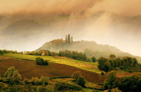 panorama di Montechino nella val Riglio